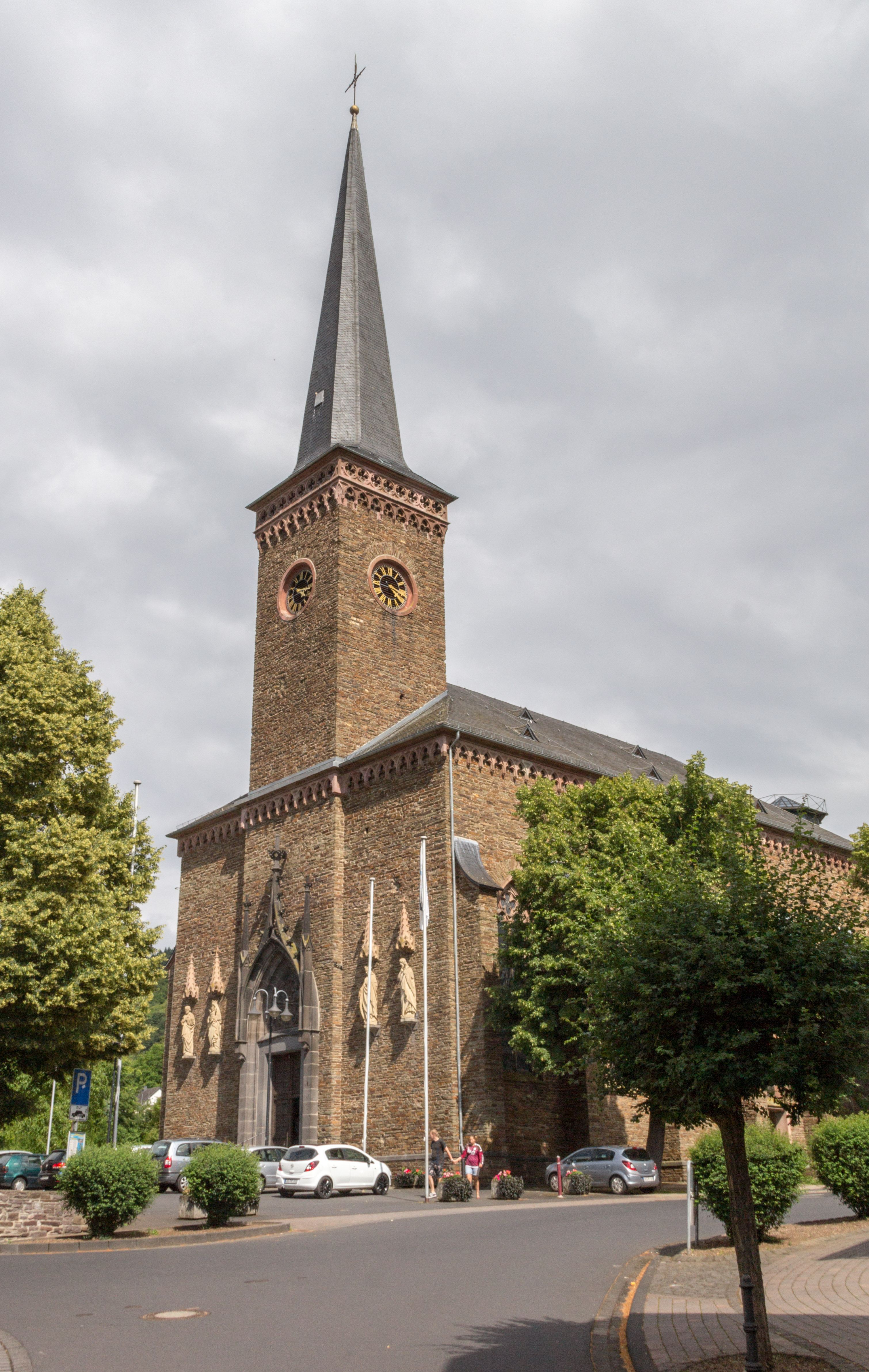 Treis-Karden, Katholische Pfarrkirche St. Johann Baptist